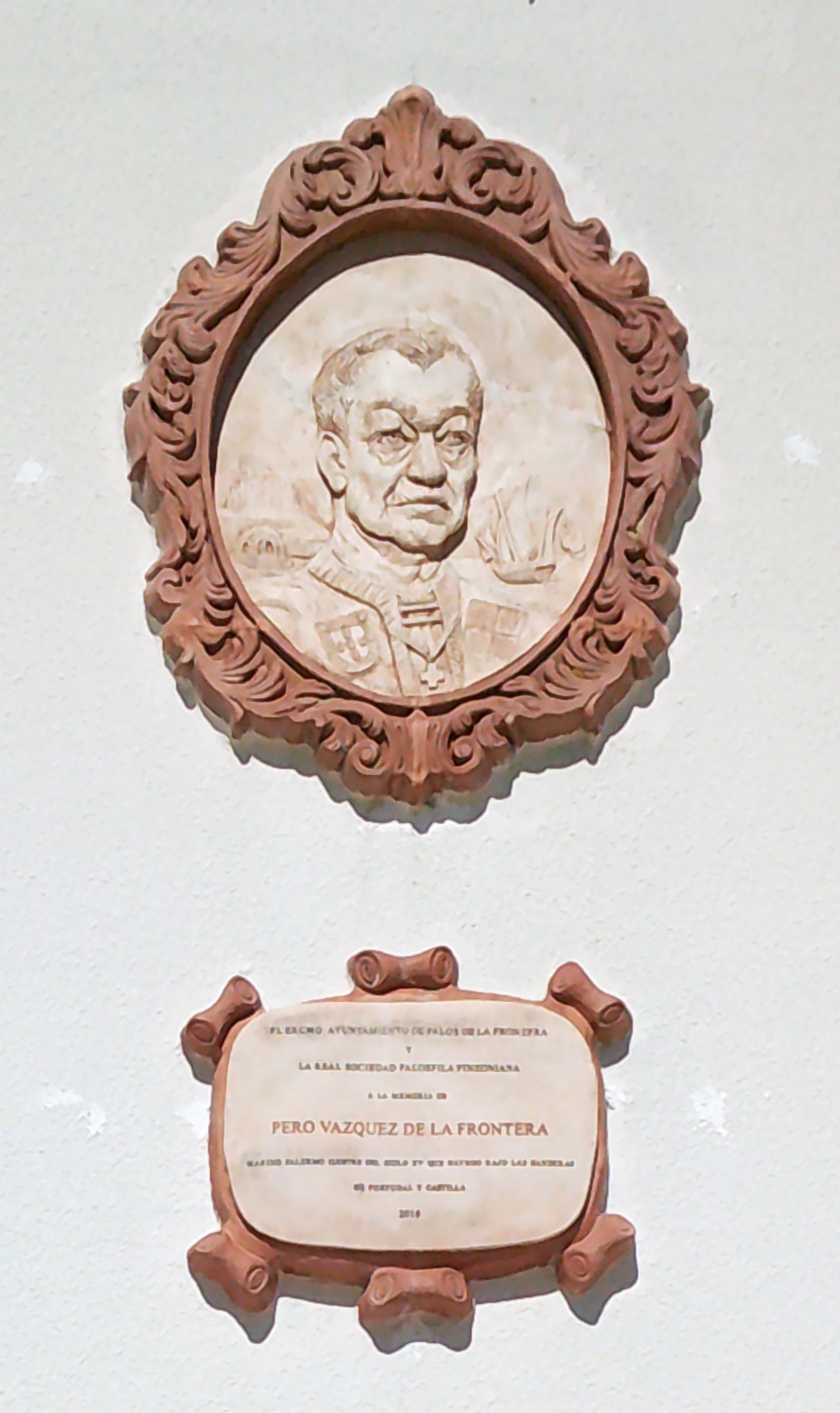 Pero Vázquez de la Frontera. Plaza de España. Palos de la Frontera, provincia de Huelva, Andalucía, España.